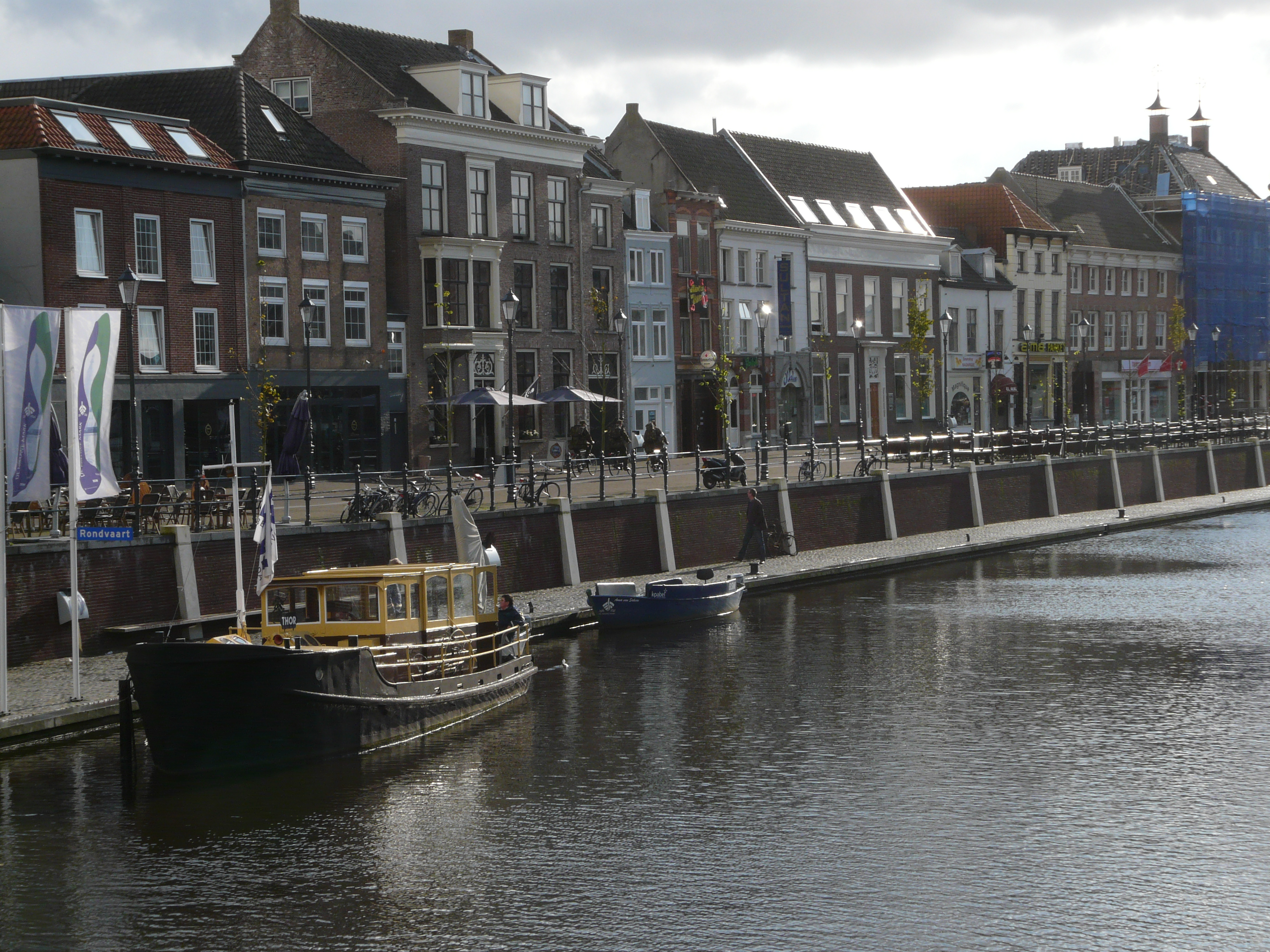 Zicht op deel van de straat de Haven (Breda). Gelegen in de haven van Breda